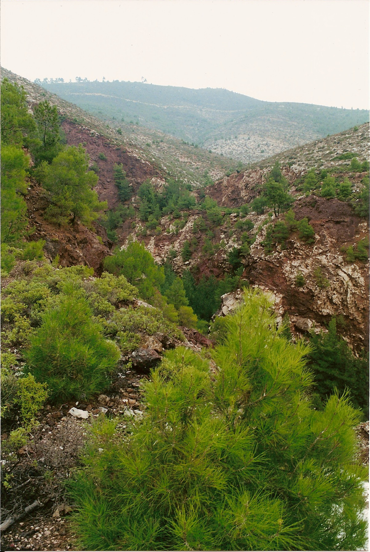 Mavrolakkas Iron Mine, Thasos.